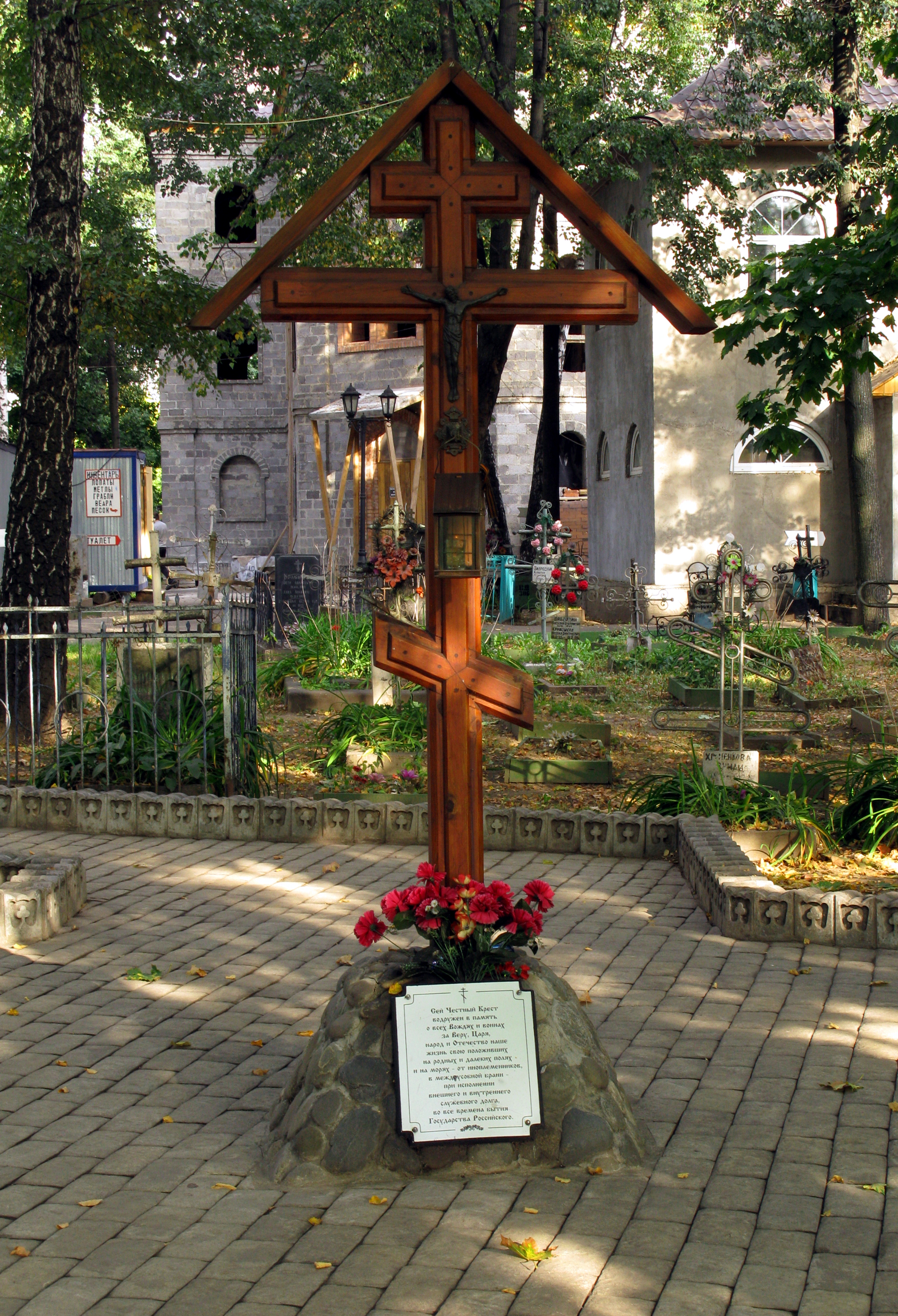 Церковь Успения Пресвятой Богородицы в Вешняках Честный Крест на церковном кладбище.